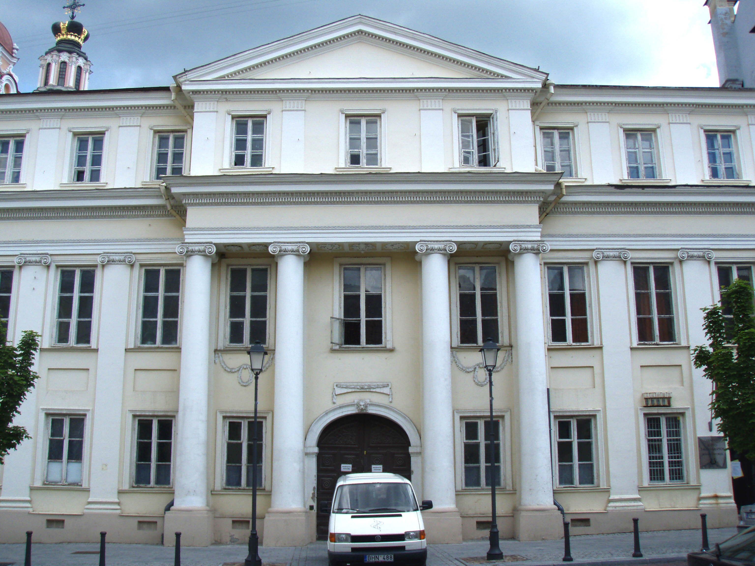 Vilniaus Juozo Tallat-Kelpšos konservatorija Didžioji g. 36